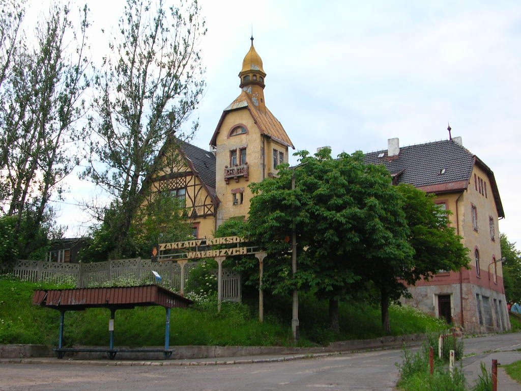 Wałbrzych - Zakłady Koksownicze "Wałbrzych" przy ul.Beethovena.